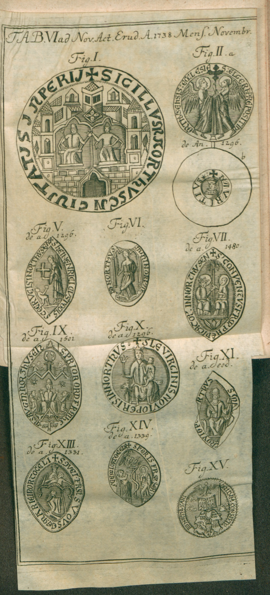 Illustration